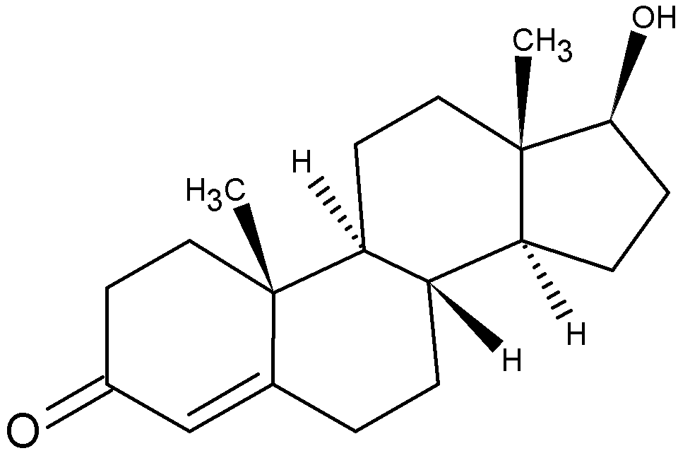 Testosterone 3D structure